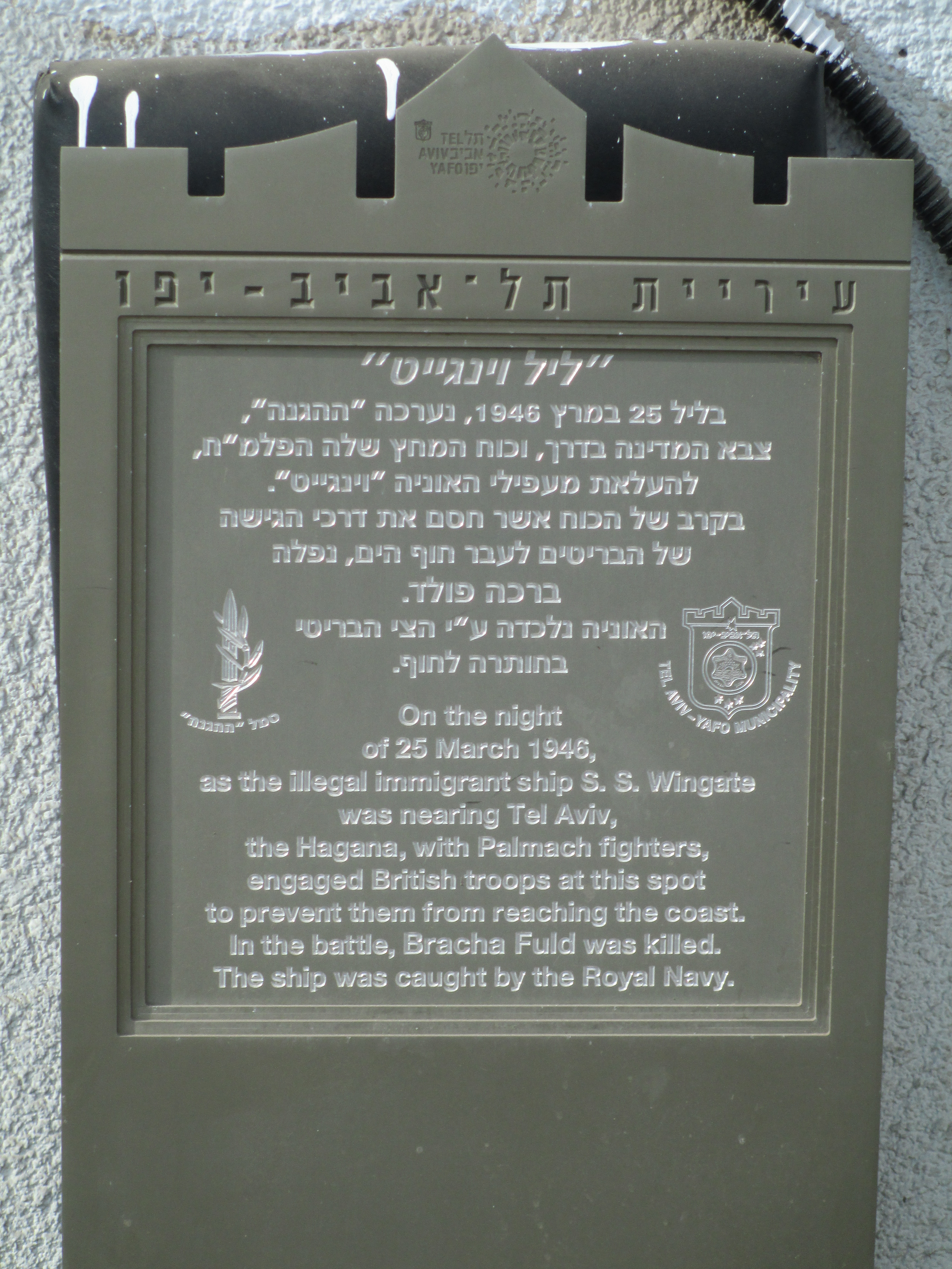 לוחית זיכרון לברכה פולד ברחוב ברכה פולד פינת אבן גבירול בתל אביב